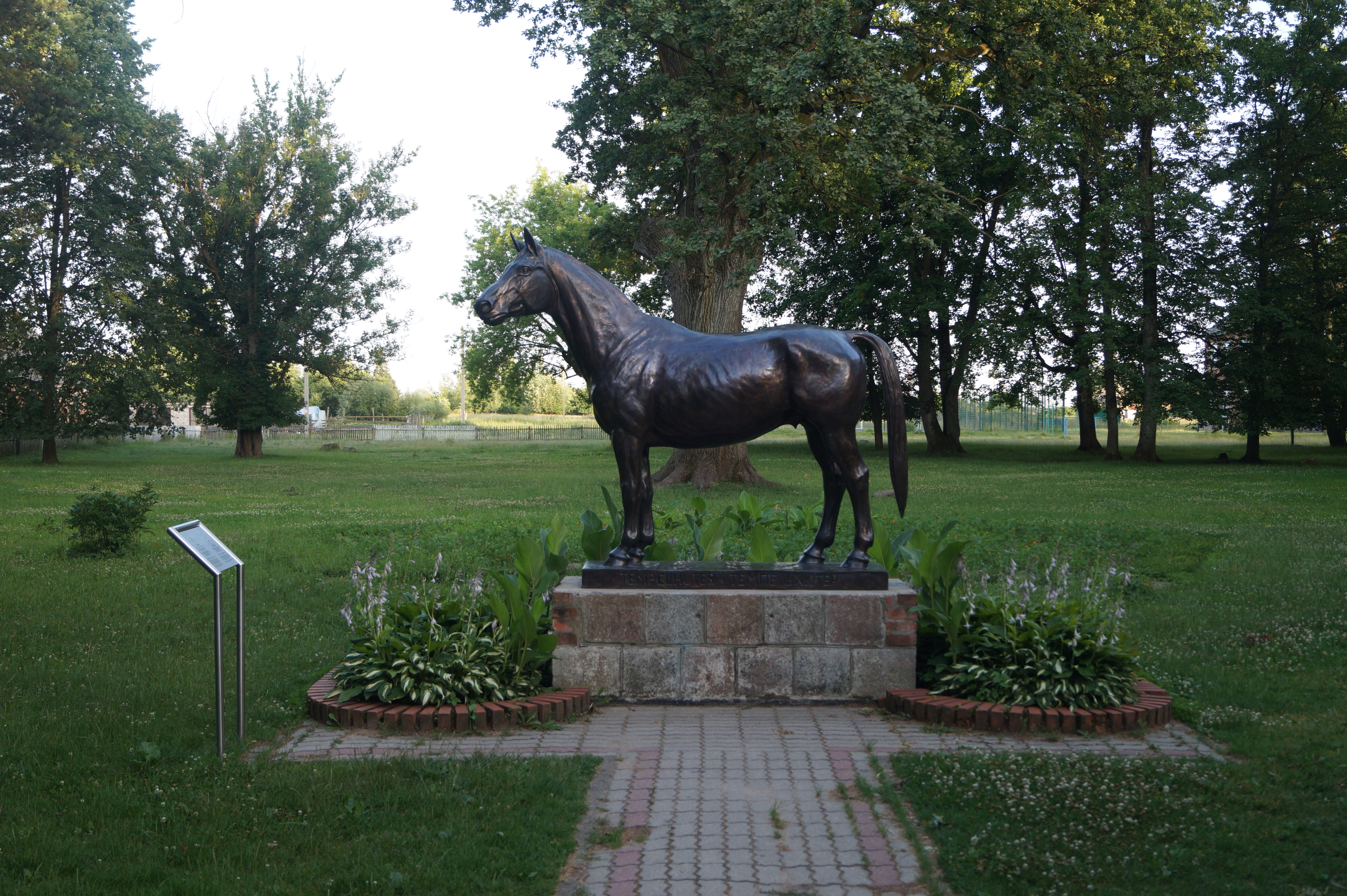 Kopie des Tempelhüters im heutigen Trakehnen/Jasnaja Poljana